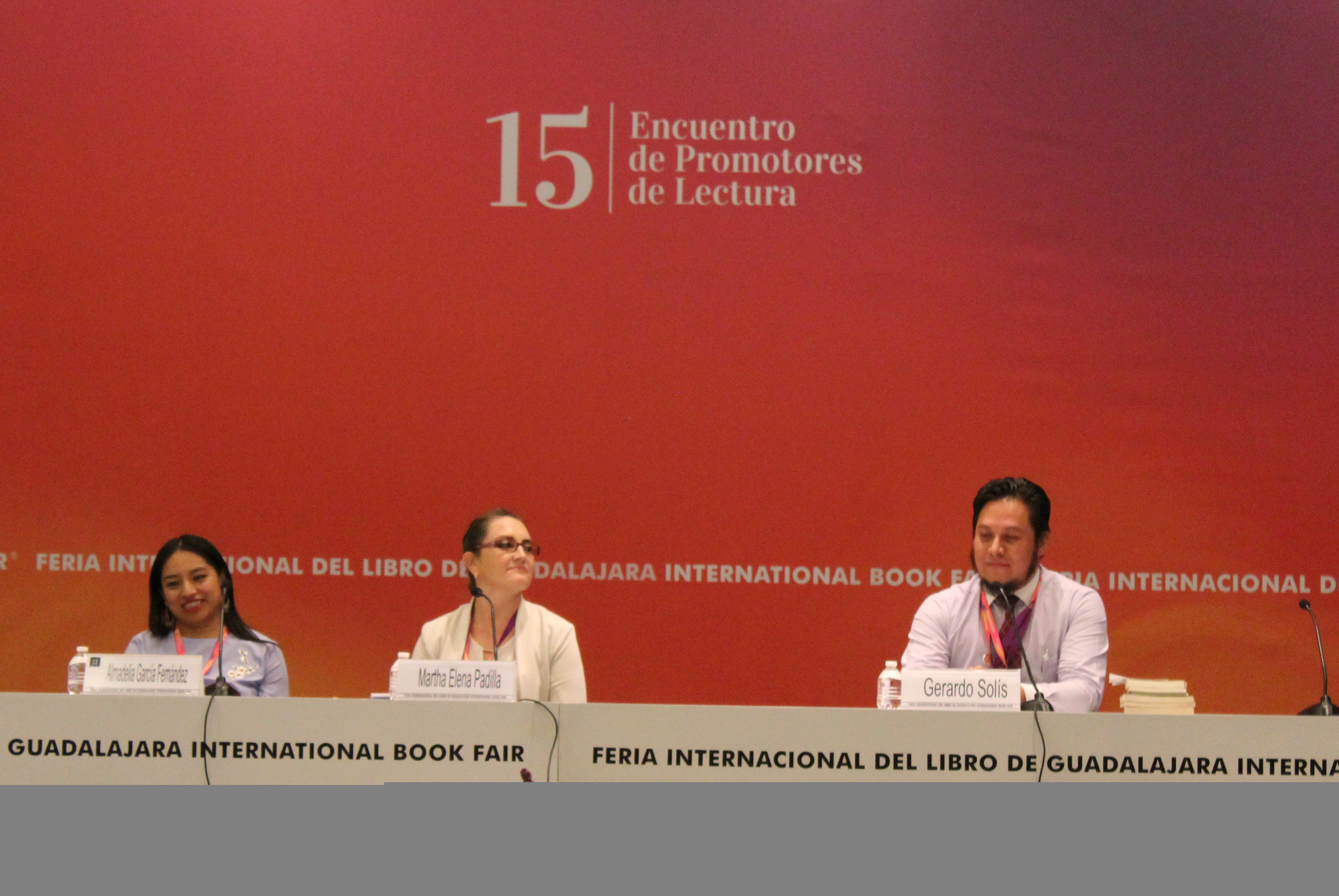 Gerardo Solís Salazar, participando como conferencista en la Feria Internacional del Libro de Guadalajara 2017. Invitado por la Secretaría de Cultura del Gobierno de México, Gobierno del Estado de Jalisco, Gobierno de Guadalajara, Universidad de Guadalajara. Durante el 15avo encuentro de promotores de lectura. Salón Juan Rulfo, planta baja.